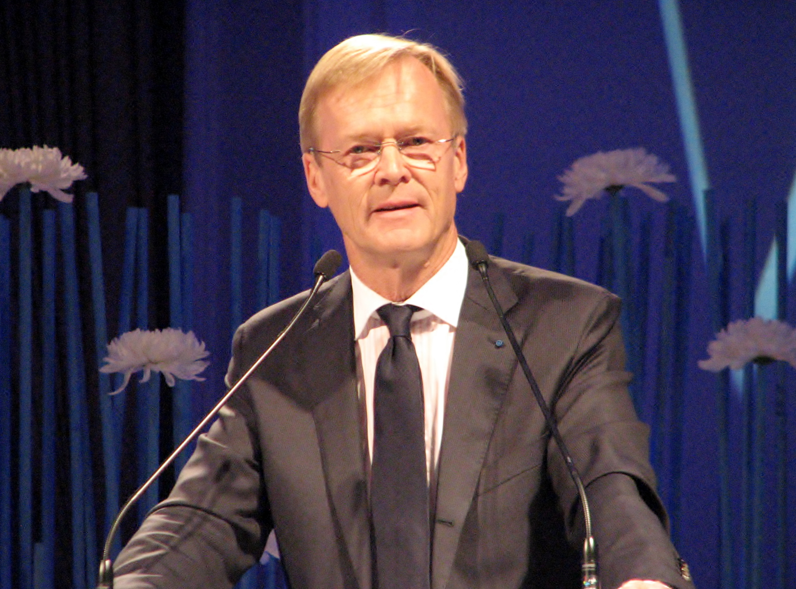 Ari Vatanen esinemas Estonia kontserdisaalis konverentsil "ERSP 25 – milleks meile erakonnad?"